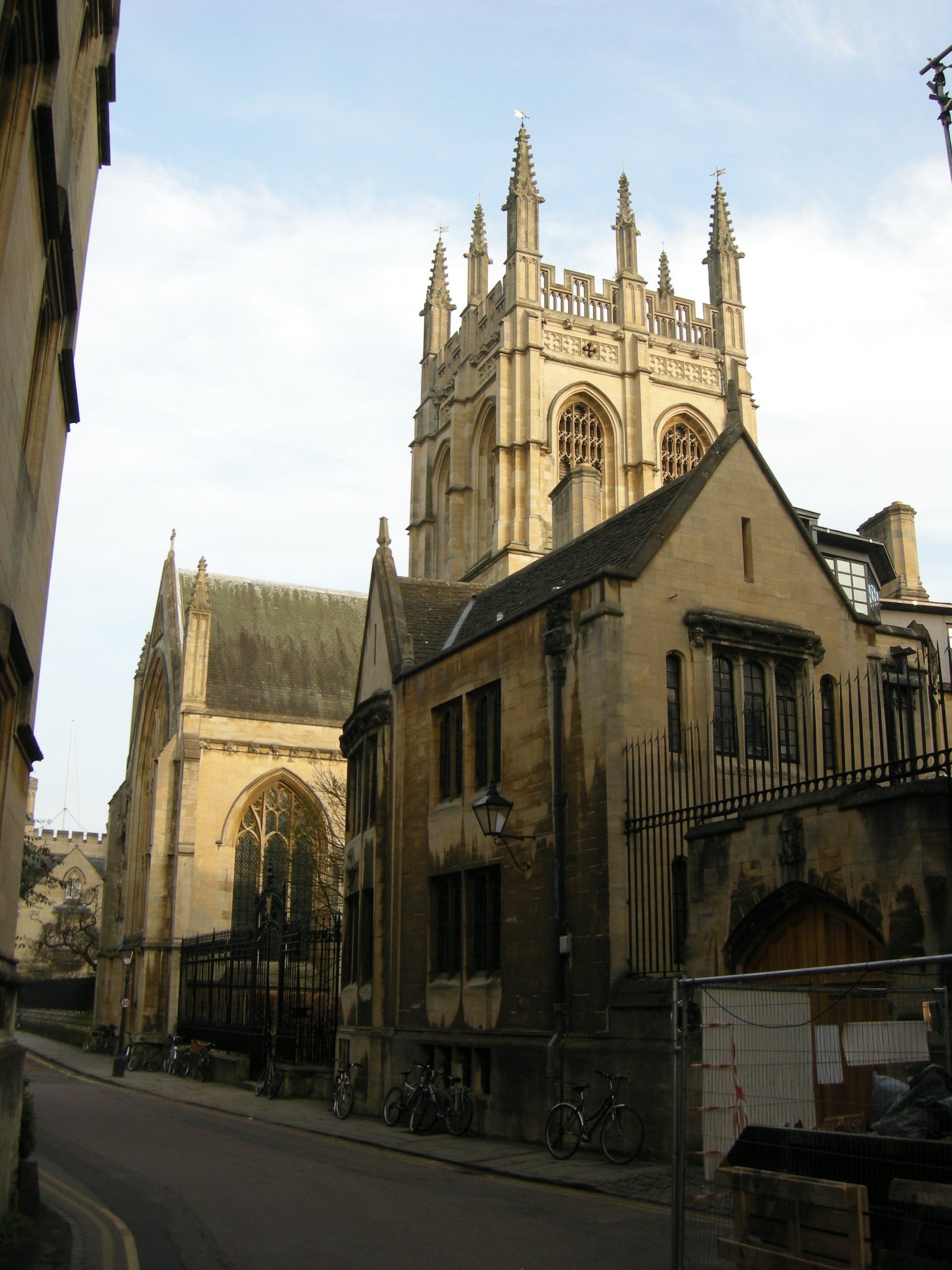 Merton college